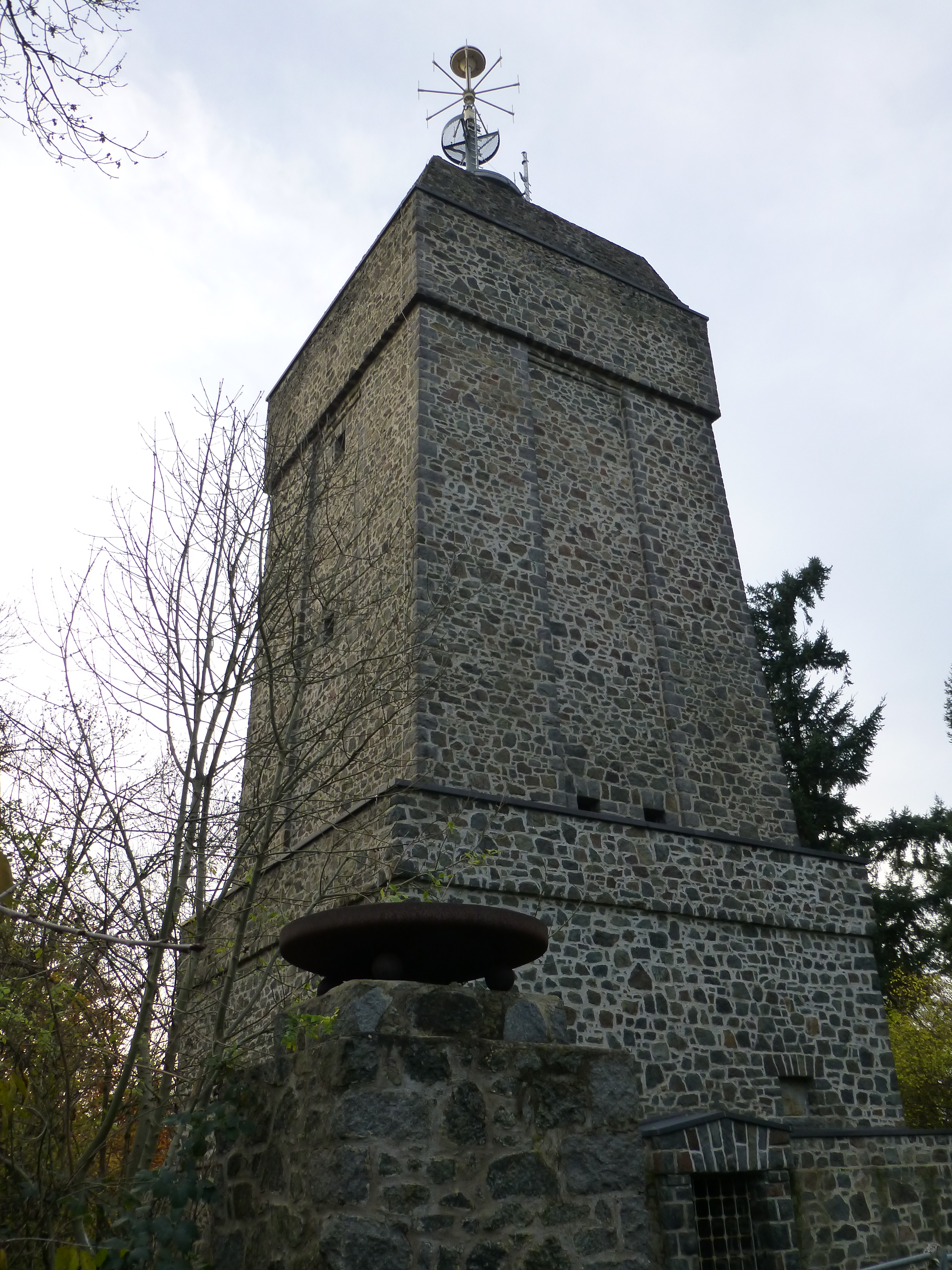 Bismarckturm auf dem Dammerberg bei Darmstadt